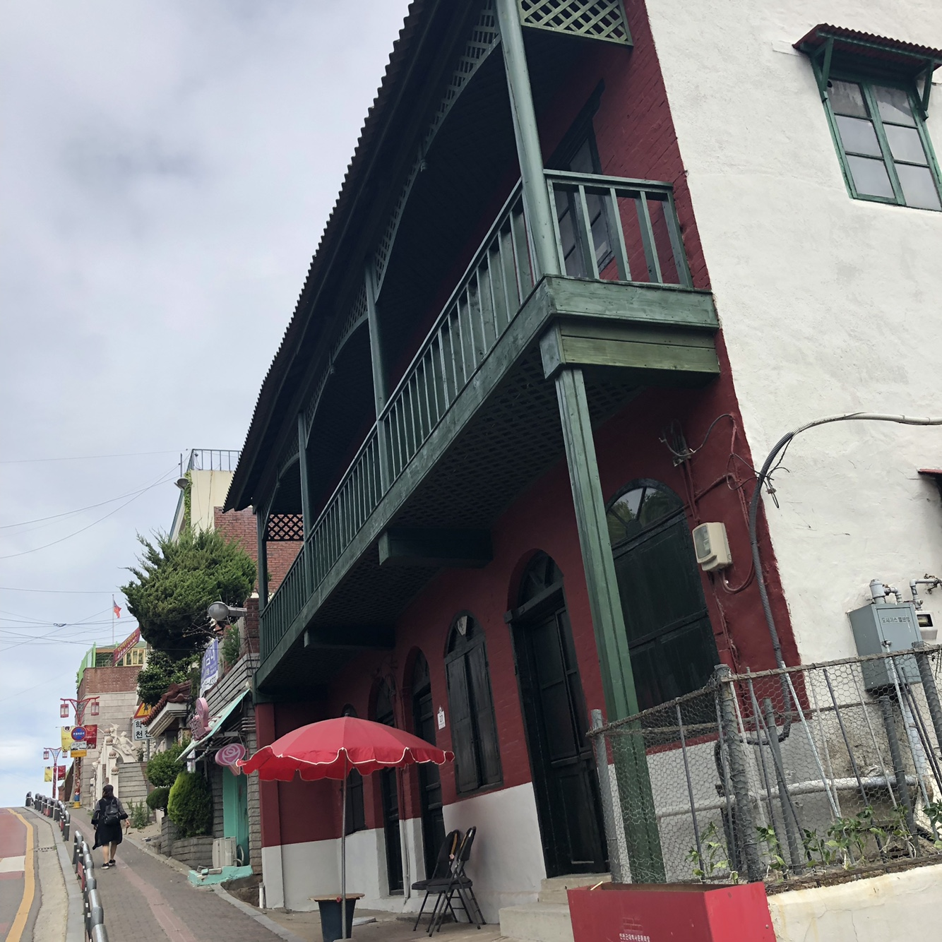 인천 차이나타운에 있는 청일 조계지 경계 계단의 좌측에 있는 청국 조계지 거리